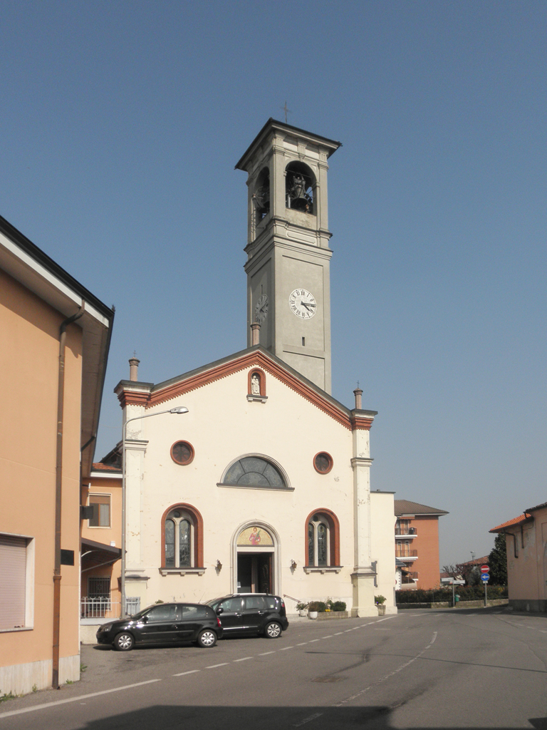 La chiesa parrocchiale di Santo Stefano Protomartire a Mulazzano.